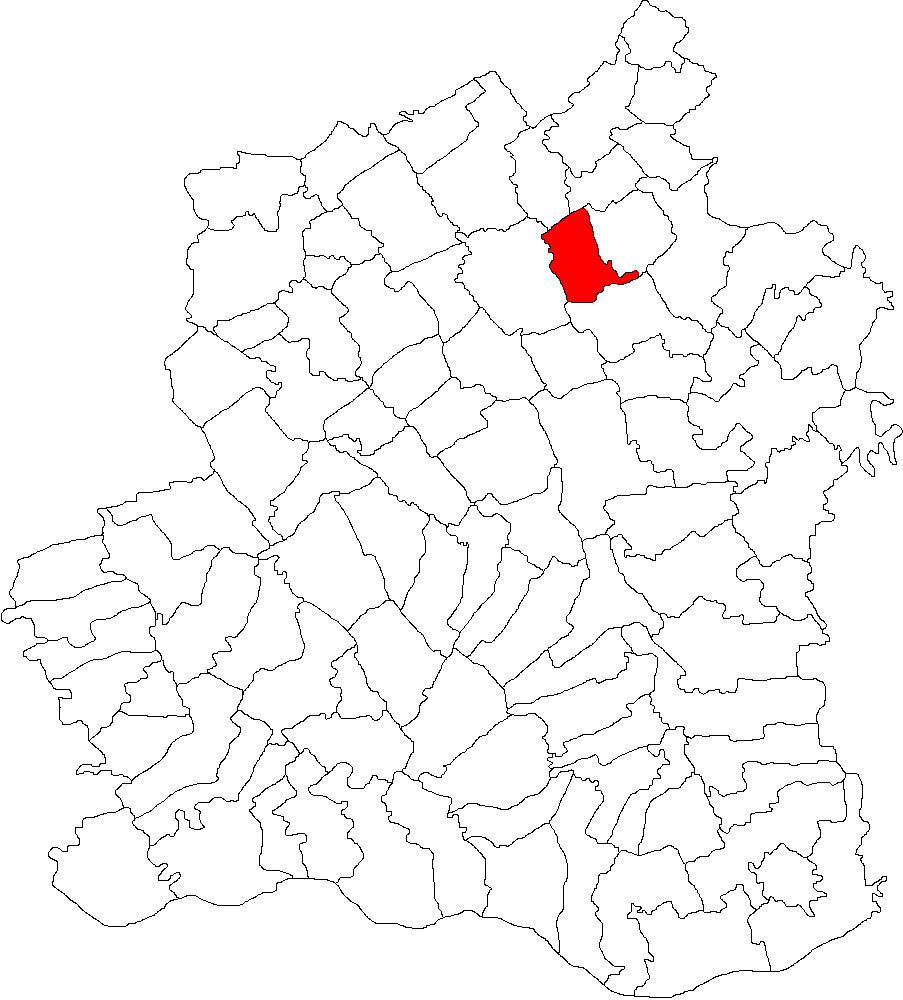 Categorie:Hărţi ale judeţului Teleorman